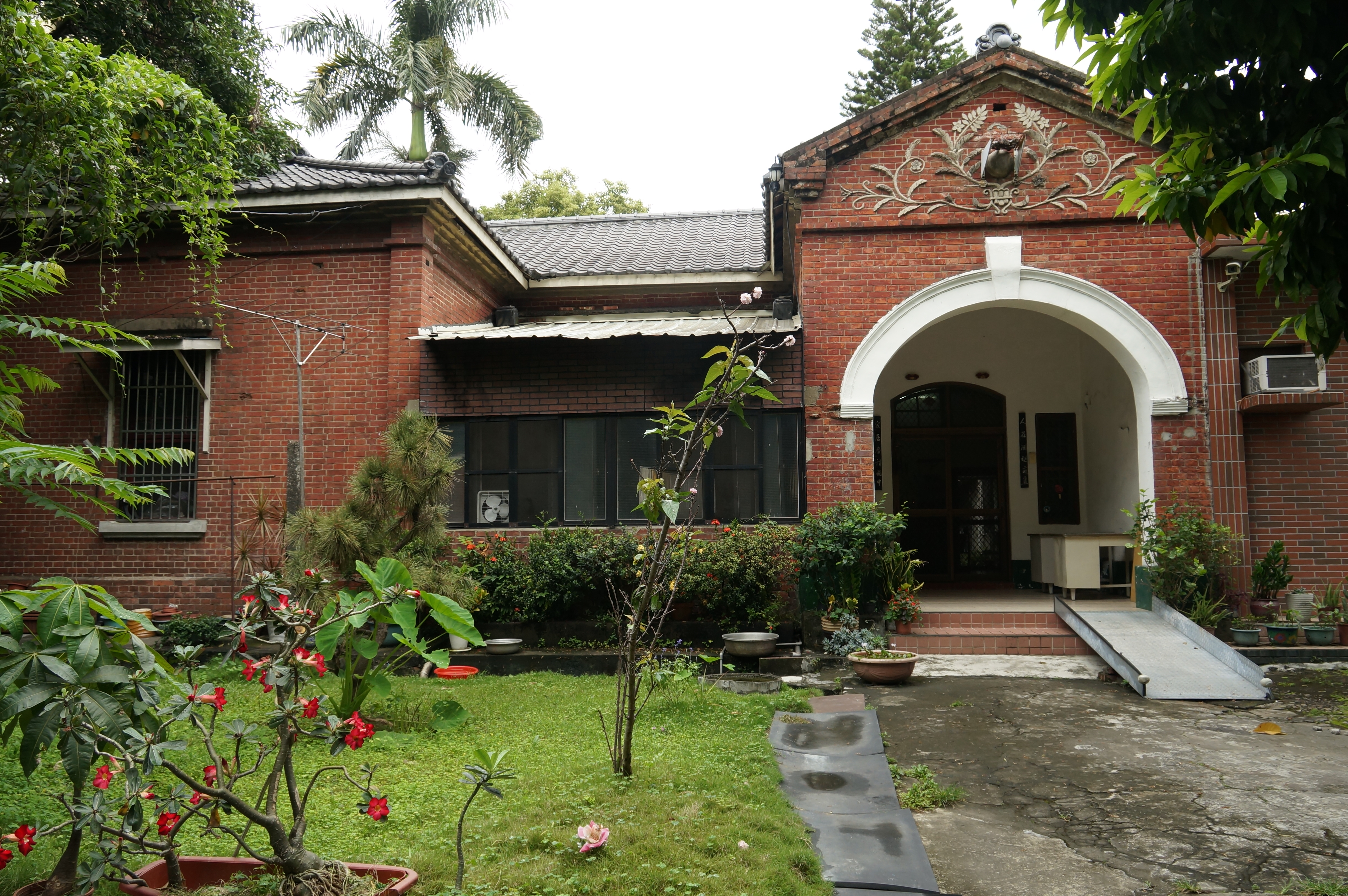 台中瑾園，日據時期台灣文化運動要角林子瑾的故居，台中市政府已將它列為歷史建築，惟因土地爭議尚未發佈，未列入甚為可惜。且林子瑾為林氏宗祠籌建第一任委員長。故借用其ID，以免有遺珠之憾。